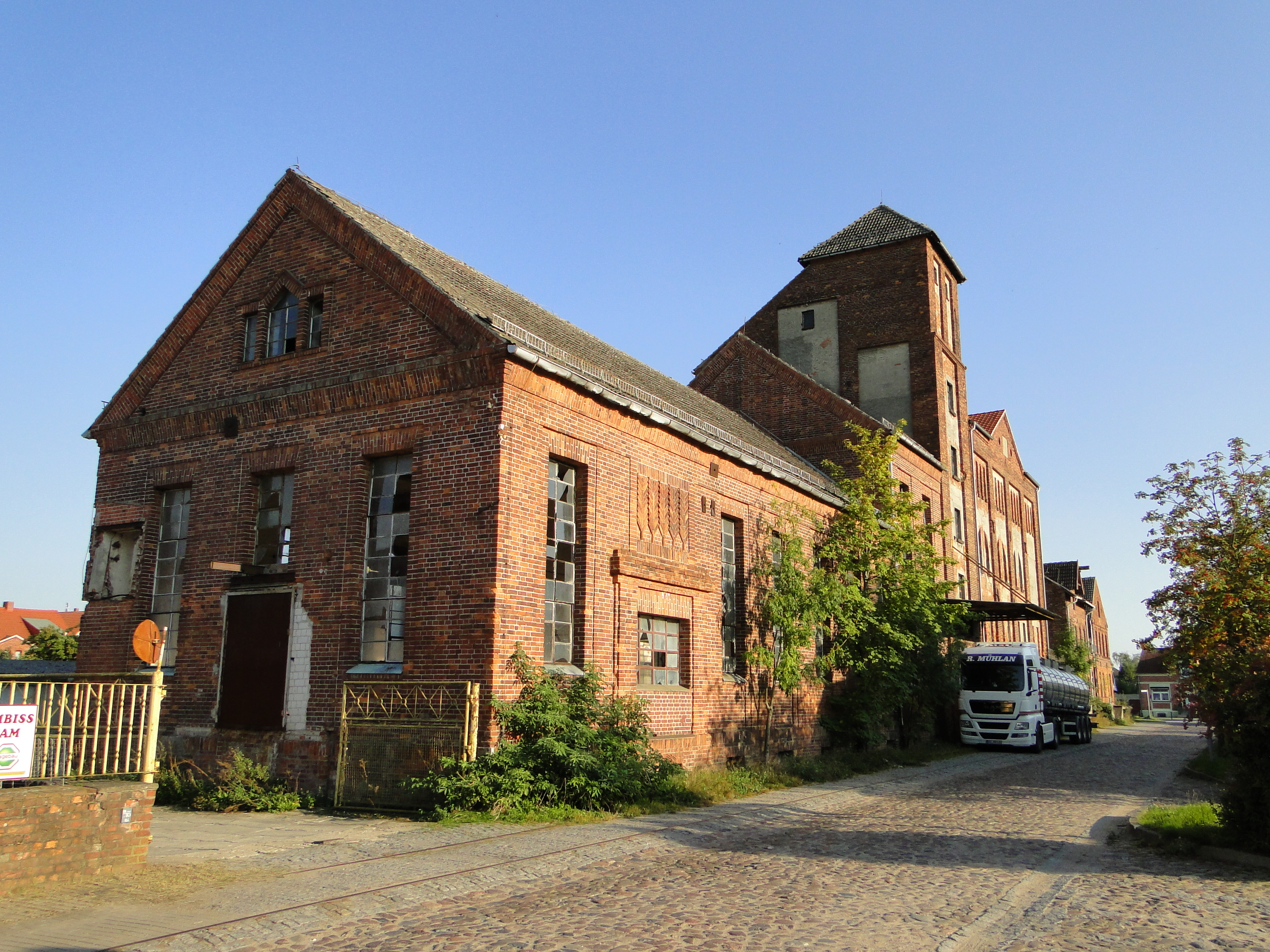 Gebäude (ehem. Genossenschaftsmolkerei) - Karstädt, Prignitz, mit Schienenrest der Westprignitzer Kreisringbahn.